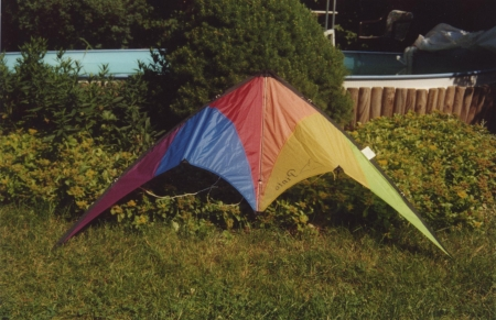 ein Deltadrachen von marian Szengel